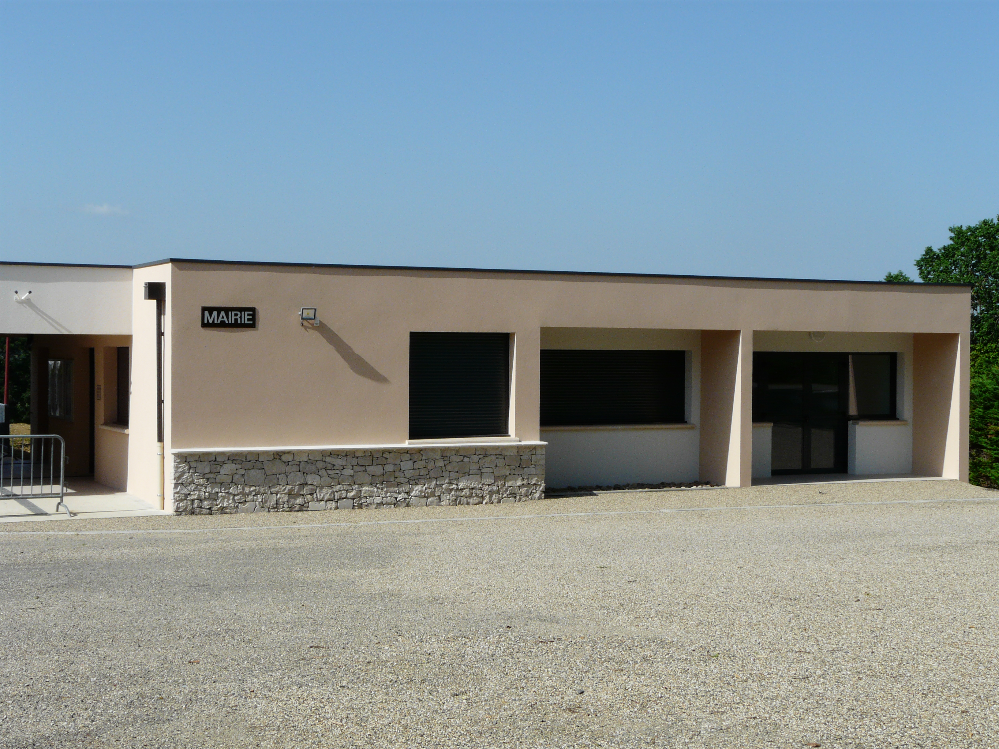 La mairie de Calignac, Lot-et-Garonne, France.